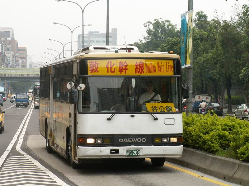 大都會客運大宇BH115V大客車AG-268。